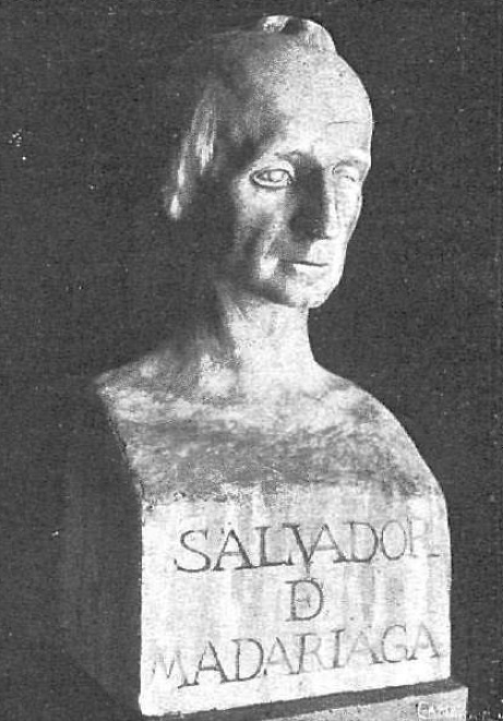 Emilio Madariaga, Retrato de su hermano, La Esfera, Madrid, 28-1-1922.jpg